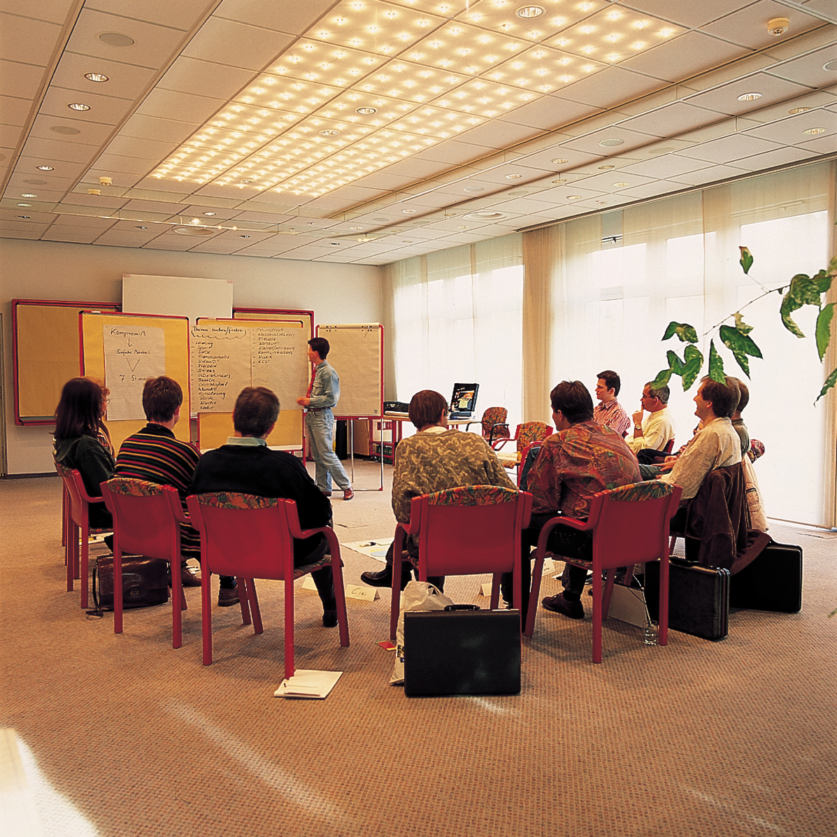 Seminarraum im Seminaris Hotel Bad Boll